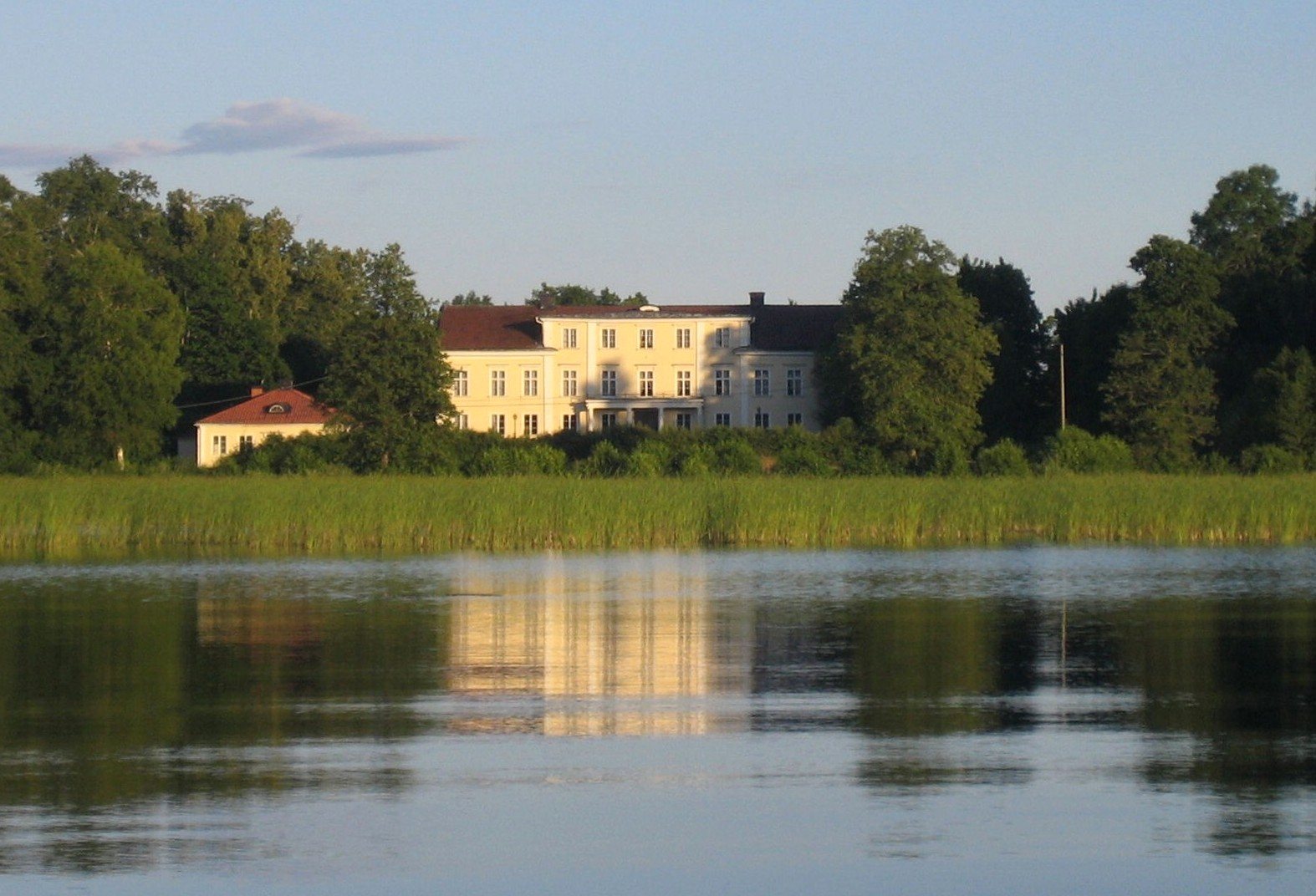 Ålhults Herrgård sedd från sjön Ören, 18 juli 2005